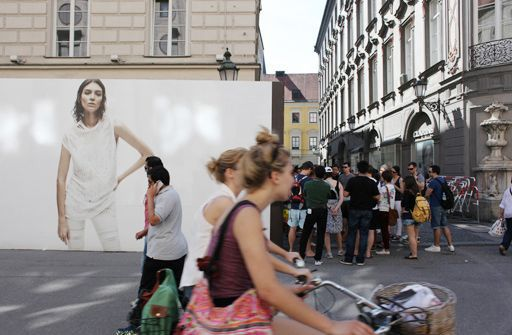 Schaufenster in Deutschland